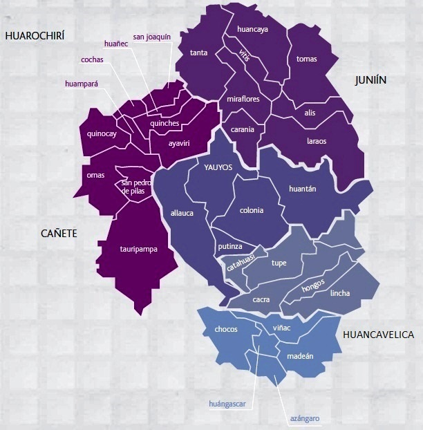 Mapa politico de la provincia de Yauyos y sus 33 distritos.